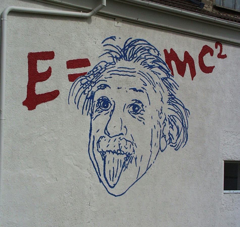 Eine Wandmalerei beim Museum